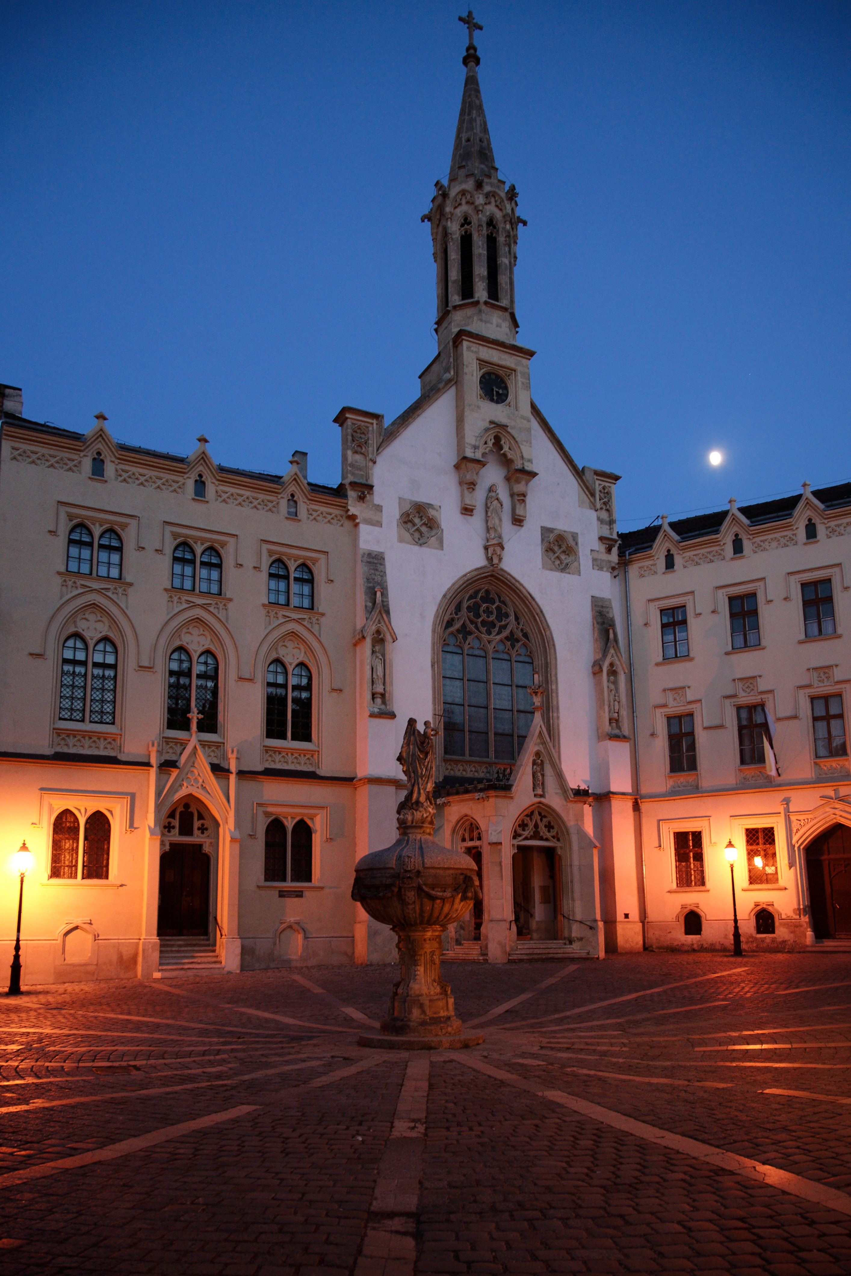 Mária kút (Sopron, Orsolya tér) This is a photo of a monument in Hungary. Identifier: 4844